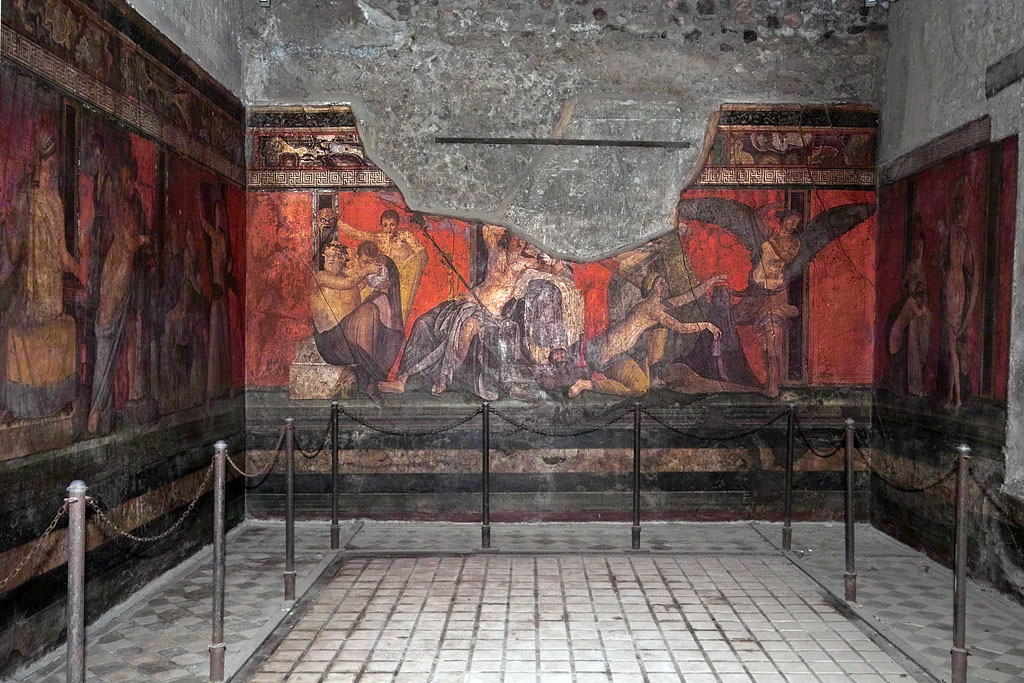 Rituale di iniziazione ai Misteri. Dettaglio dell'affresco della Villa dei Misteri a Pompei, dipinto nel "secondo stile" pompeiano, del 60 a.C. circa. Other version. Fresco from Pompei